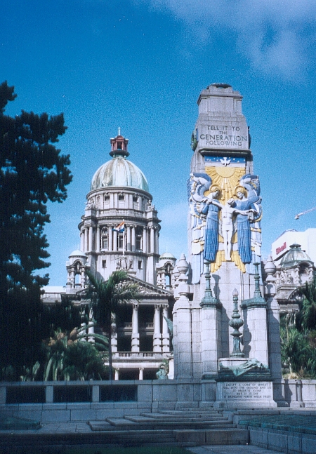 Auteur : FC Georgio Date : Septembre 1991 Sujet : Hotel de ville de Durban Reproduction et utilisation non autorisée sans l'accord de l'auteur